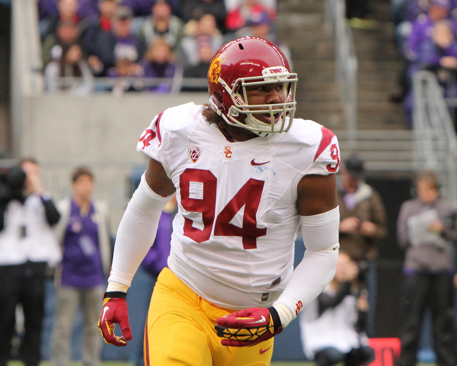 Taken by James Santelli/Neon Tommy